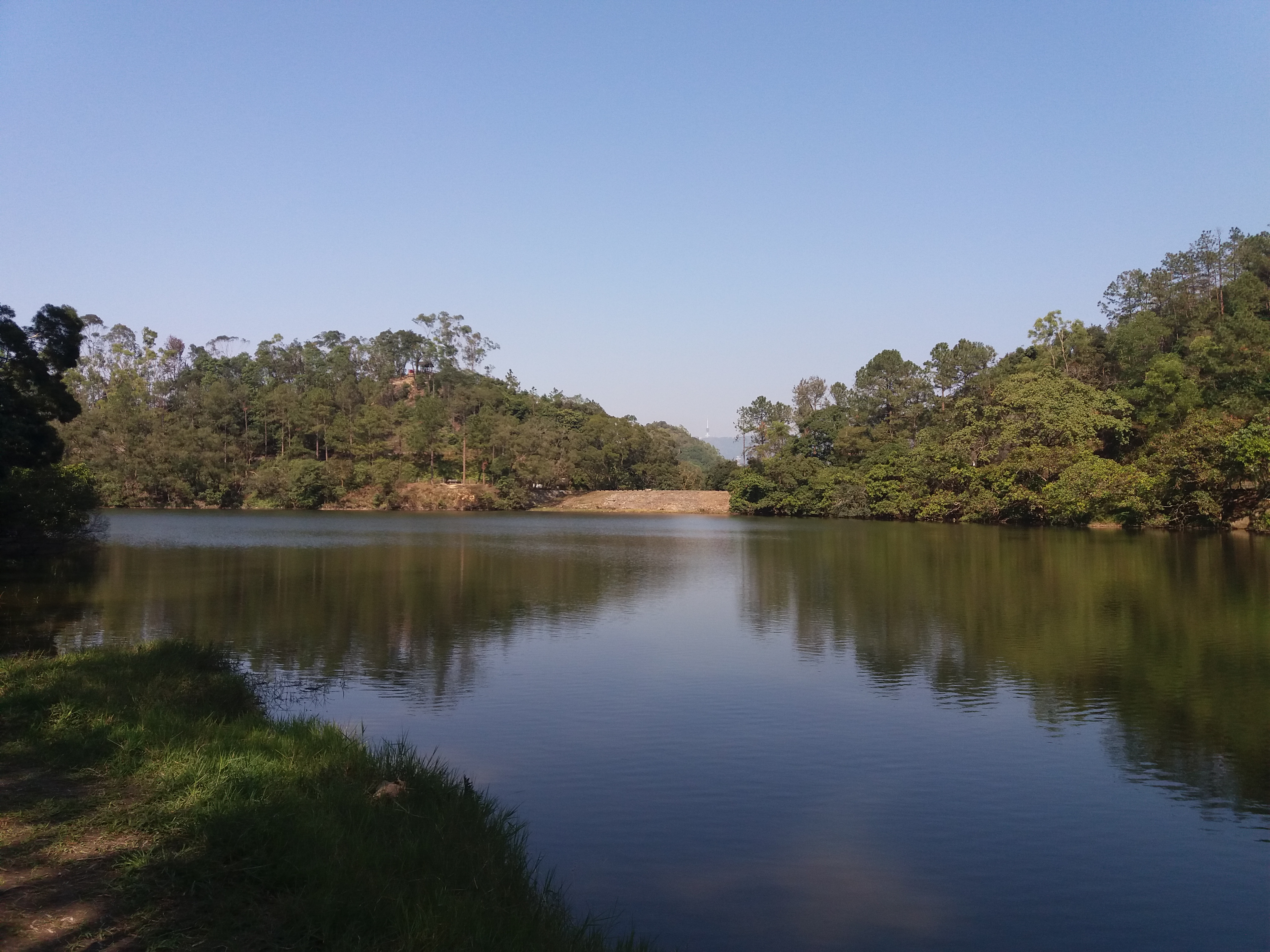 中文（香港）: 流水響水塘（2019年）